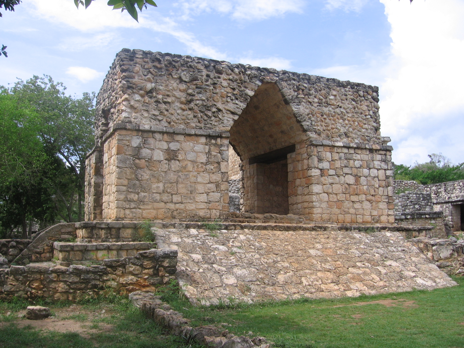 Ek Balam, Yucatan, Mexico